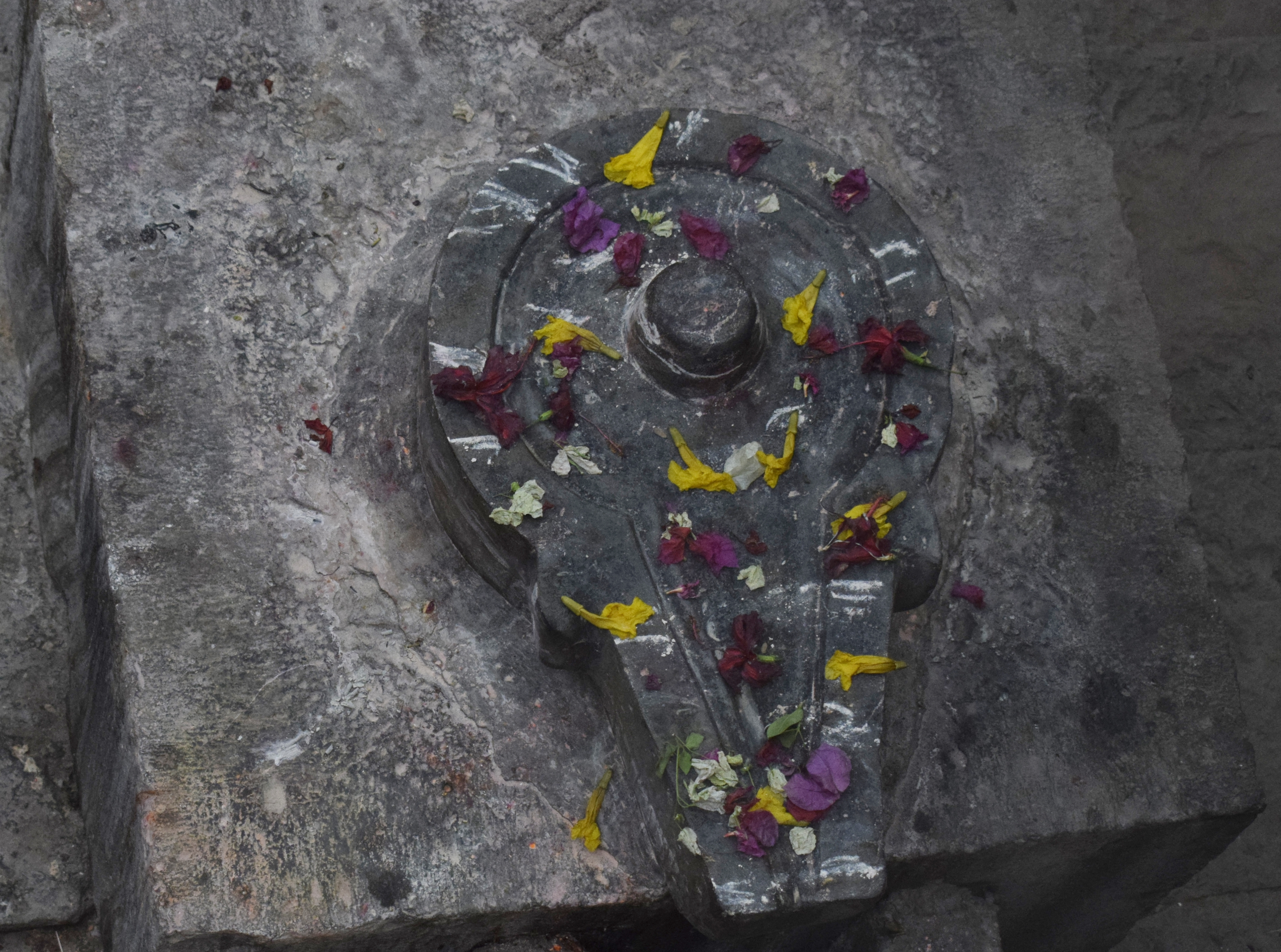 श्री अहीमुखीब्रह्मेश्वर लिंग